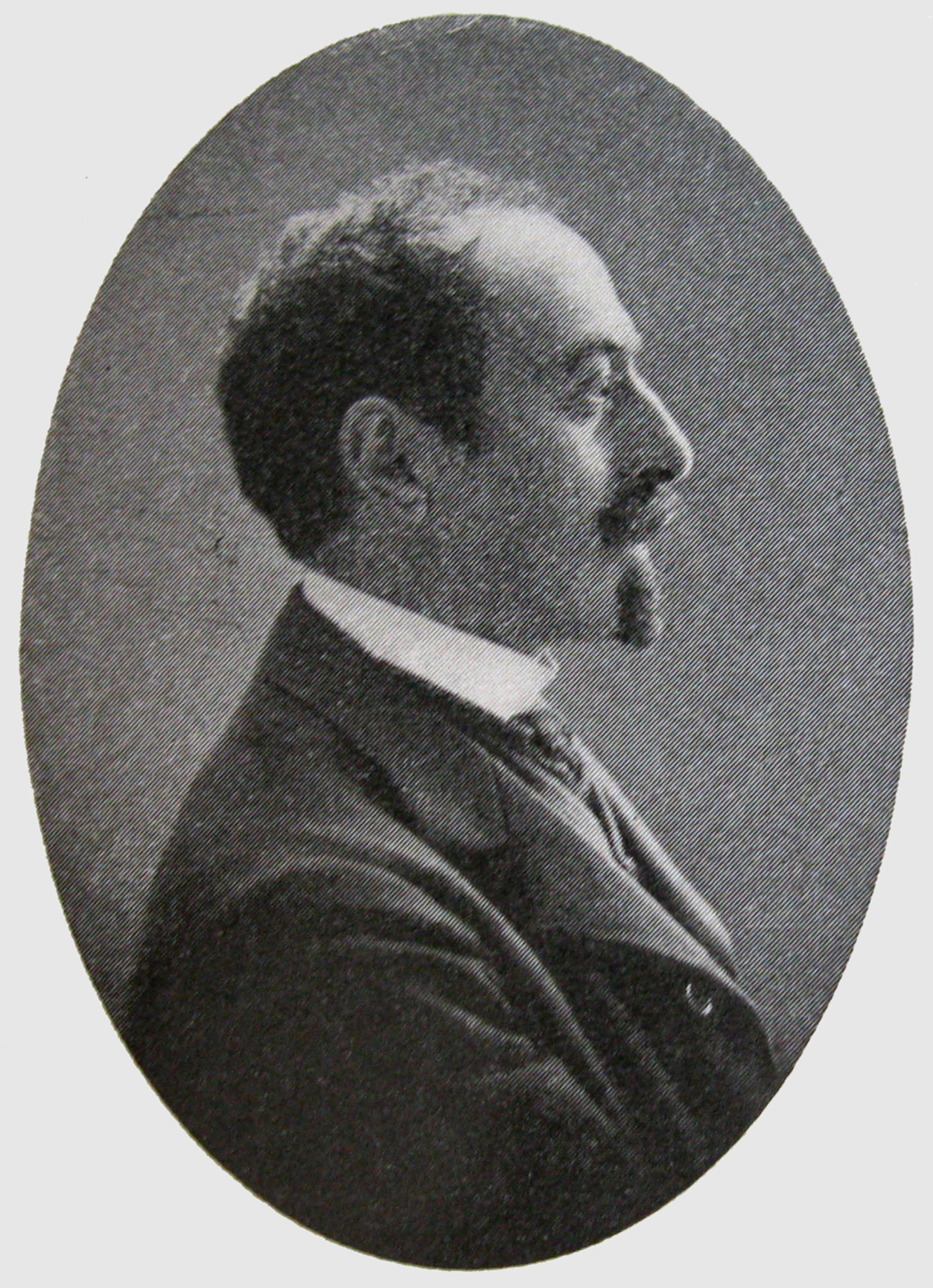 Henri Nathansen var en dansk, jødisk forfatter,(17. juli 1868 i Hjørring - 16. februar 1944 i Lund i Sverige). Skrev bl.a. under pseudonymet Frater Taciturnus. I 2006 optoges hans drama Indenfor Murene på Kulturministeriets kanon for scenekunst.